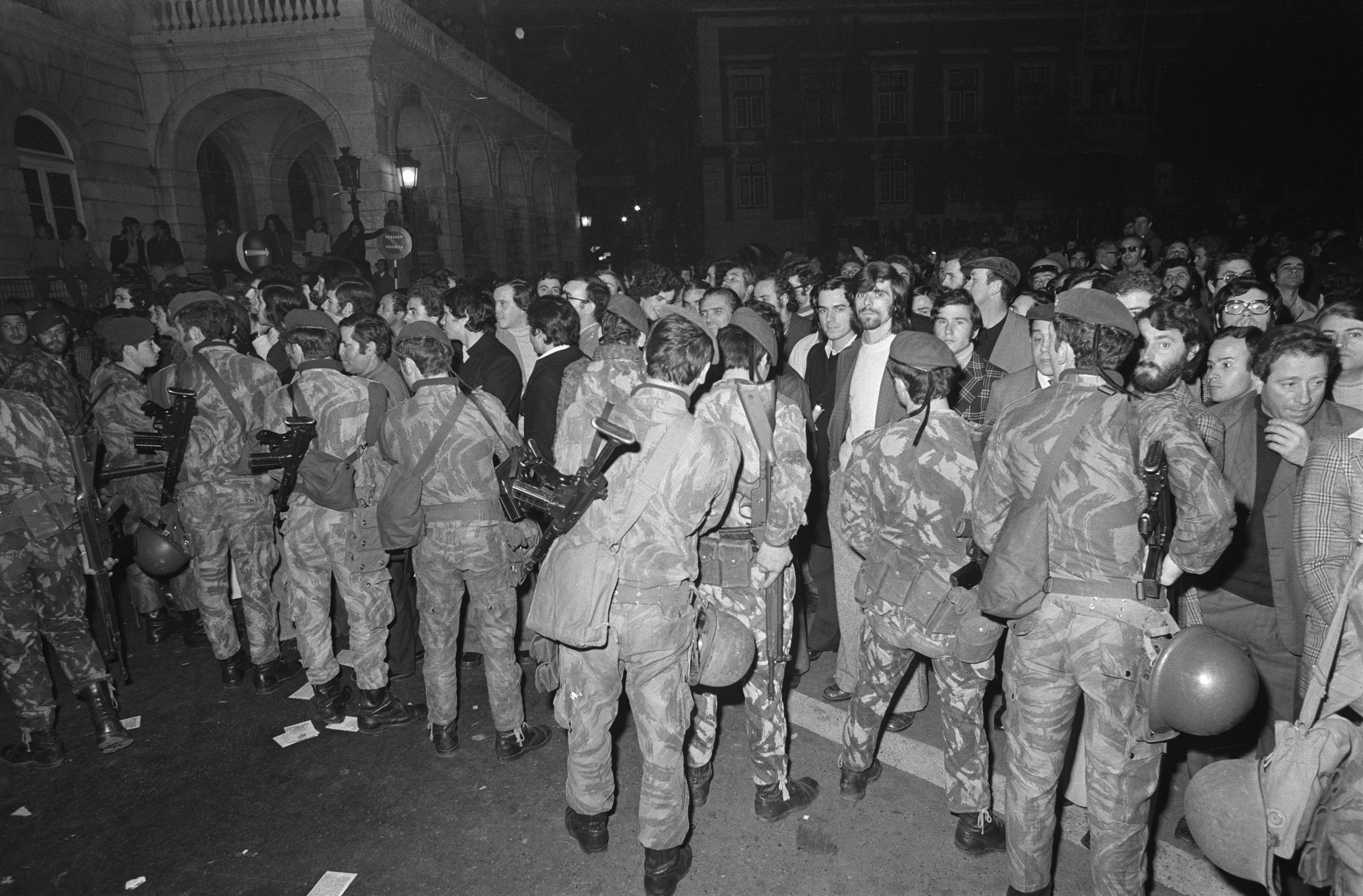 Collectie / Archief : Fotocollectie Anefo Reportage / Serie : Demonstratie in Lissabon, Portugal, verhinderd door militairen Beschrijving : Ondanks een verbod wilden leden van de Portugese Maoïstische beweging MRPP op 31 januari een betoging houden. Militairen verhinderden dat de demonstranten door de stad trokken. Bewapende militairen in gevechtskleding houden de demonstranten tegen Annotatie : Locatie: Rossio, Largo de Sao Domingos Datum : 2 februari 1975 Locatie : Lissabon, Portugal Trefwoorden : demonstraties, militairen Fotograaf : Fotograaf Onbekend / Anefo Auteursrechthebbende : Nationaal Archief Materiaalsoort : Negatief (zwart/wit) Nummer archiefinventaris : bekijk toegang 2.24.01.05 Bestanddeelnummer : 927-7282